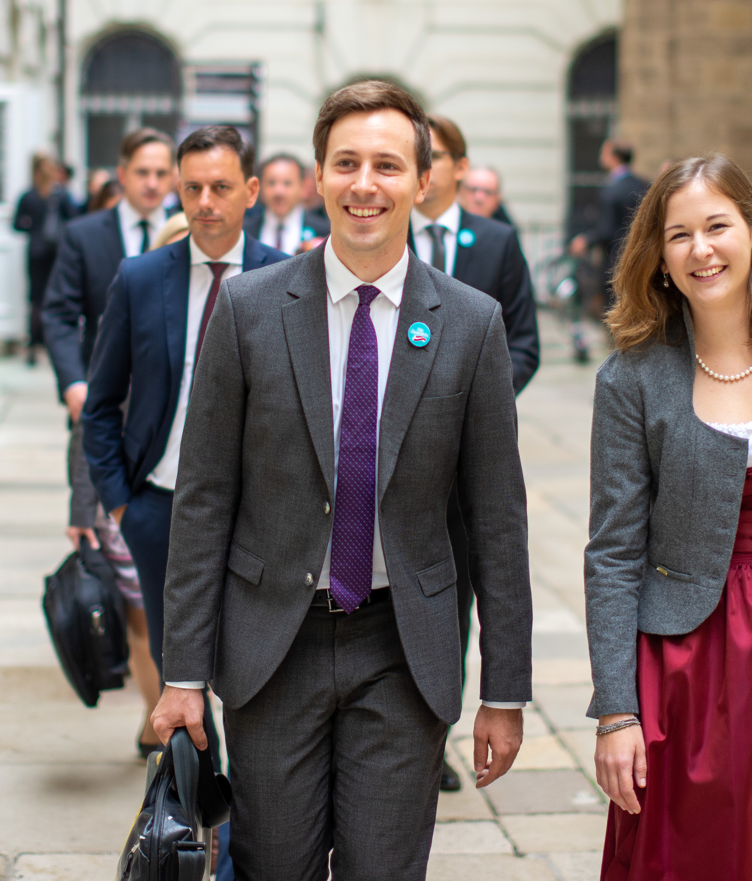 Nico Marchetti am Weg zur Angelobung des Nationalrats 2019. Aufgenommen im Kapellenhof der Hofburg.